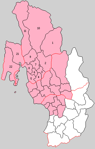 滋賀県伊香郡・西浅井郡の町村制時点の町村。